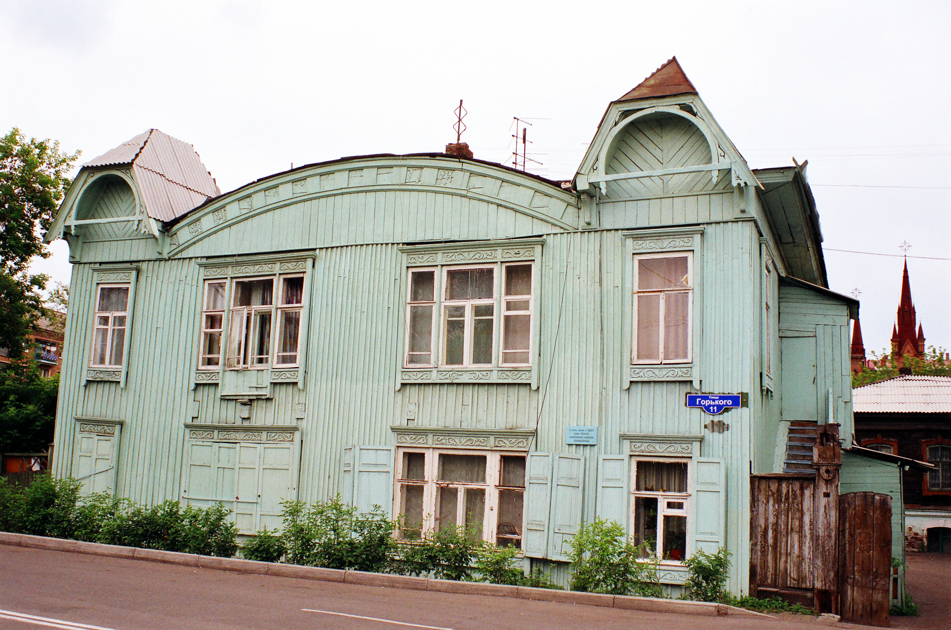 Ул. Горького, 11. Дом, в котором в 1920-е годы располагалась "Народная консерватория".